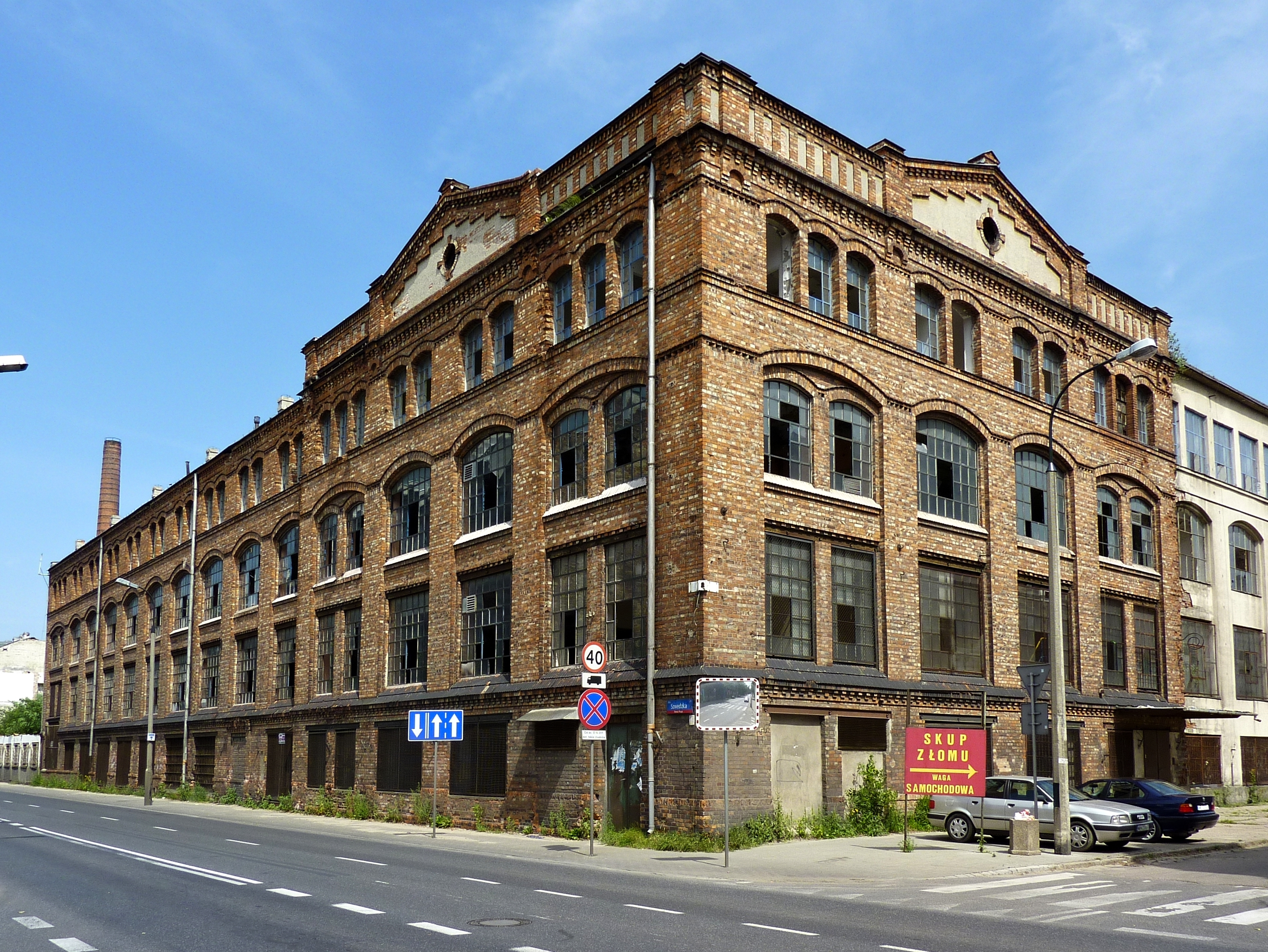 Warszawa, ul. Szwedzka 20 – zespół d. fabryki lamp i fabryki chemicznej "Praga" (zabytek nr 400-A z 30.03.2005).